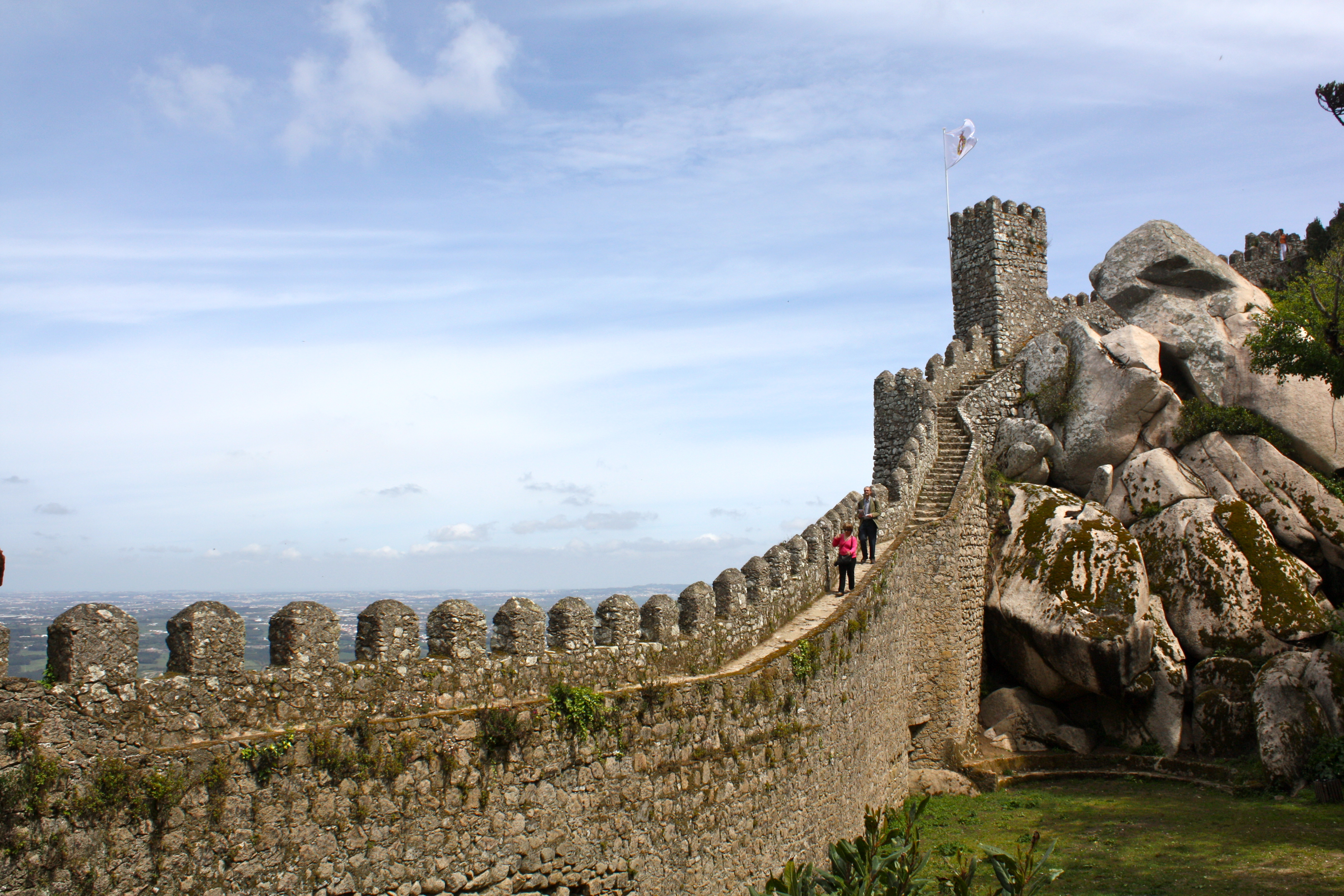 Sintras - 061